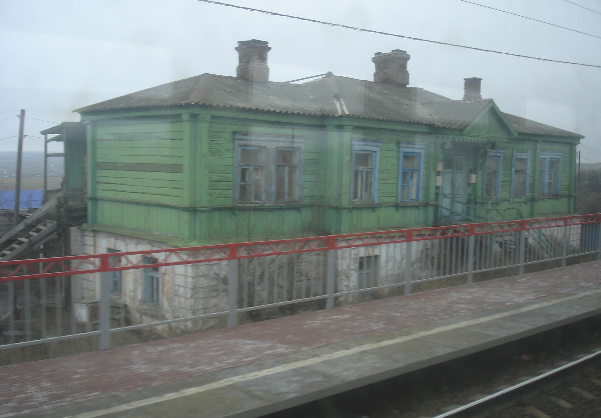 Остановочная платформа Северский Донец СКЖД - здание остановки